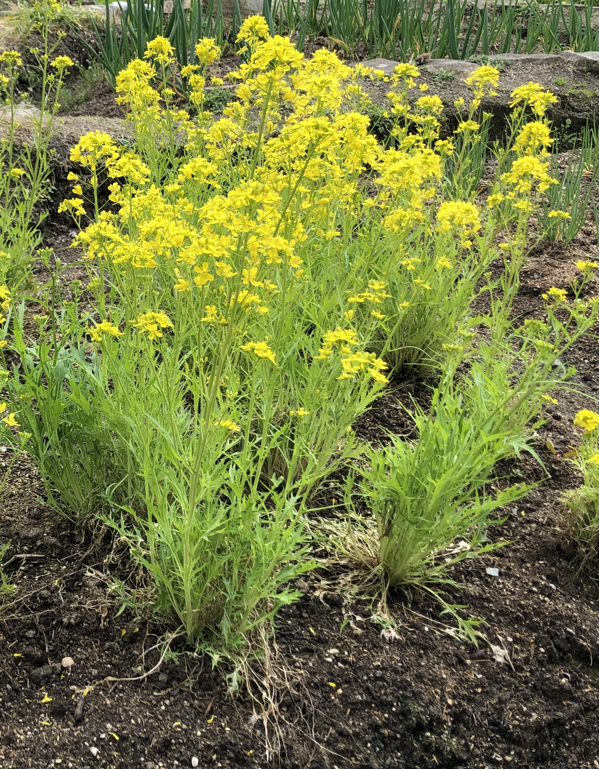 ミズナ。京都水族館の「京の里山ゾーン」で栽培。